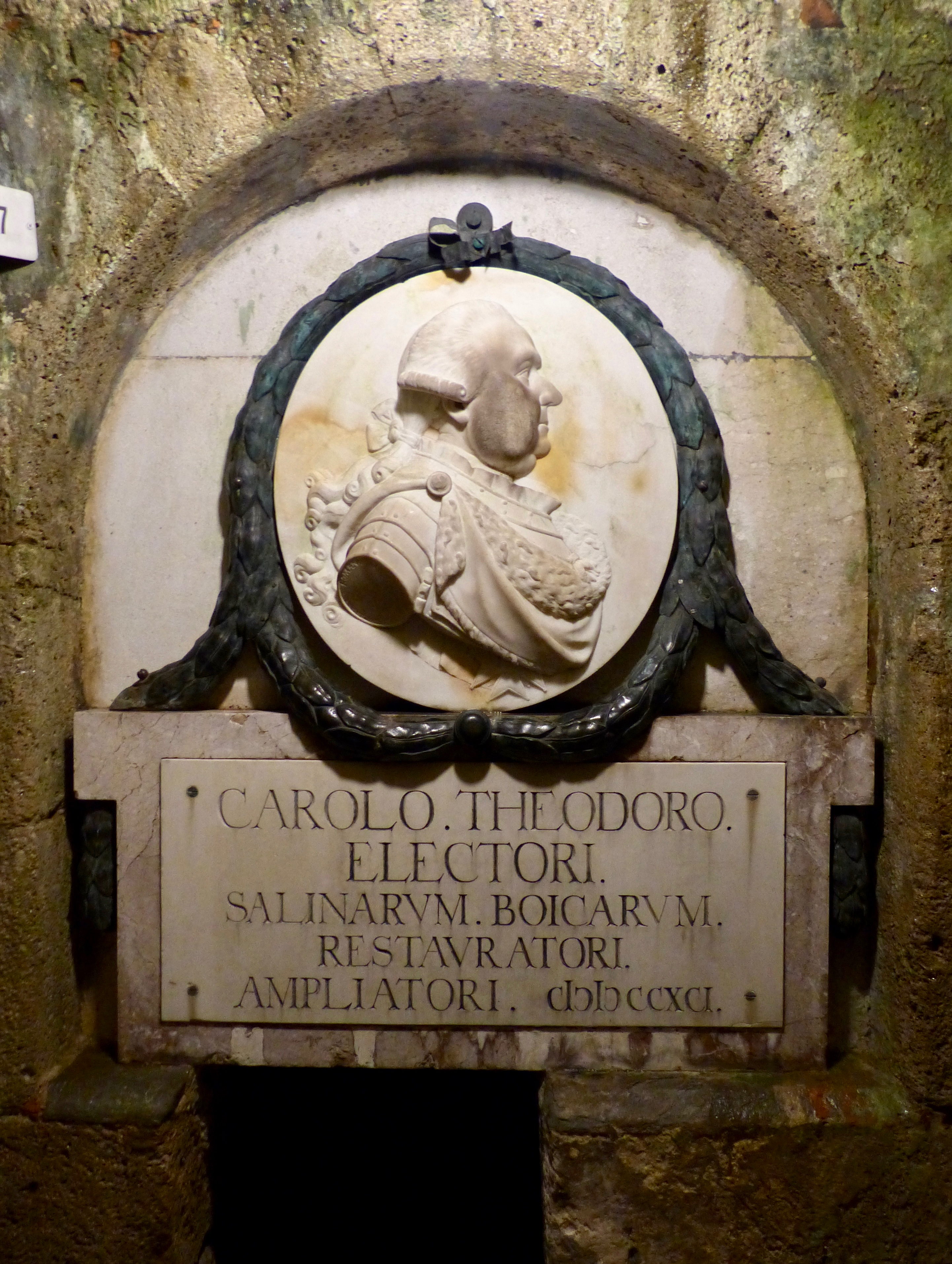 Bad Reichenhall: Alte Saline - Karl-Theodor-Stollen marmornes Reliefbild des Kurfürsten von Roman Anton Boos, 1791This is a photograph of an architectural monument.